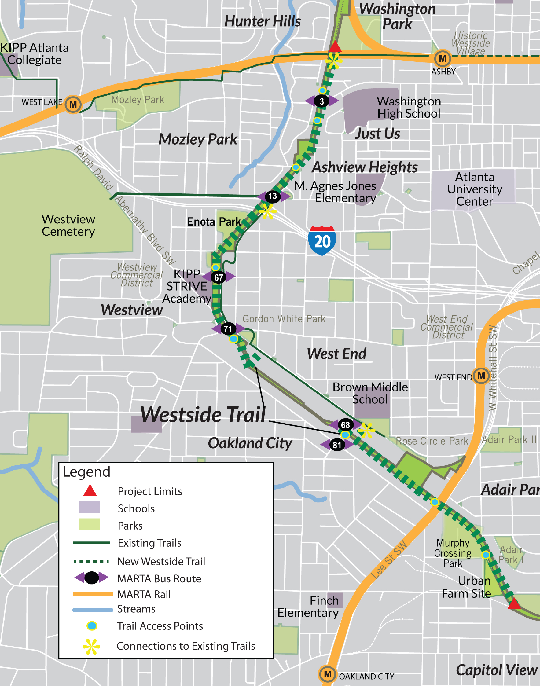 Beltline Westside Trail Map